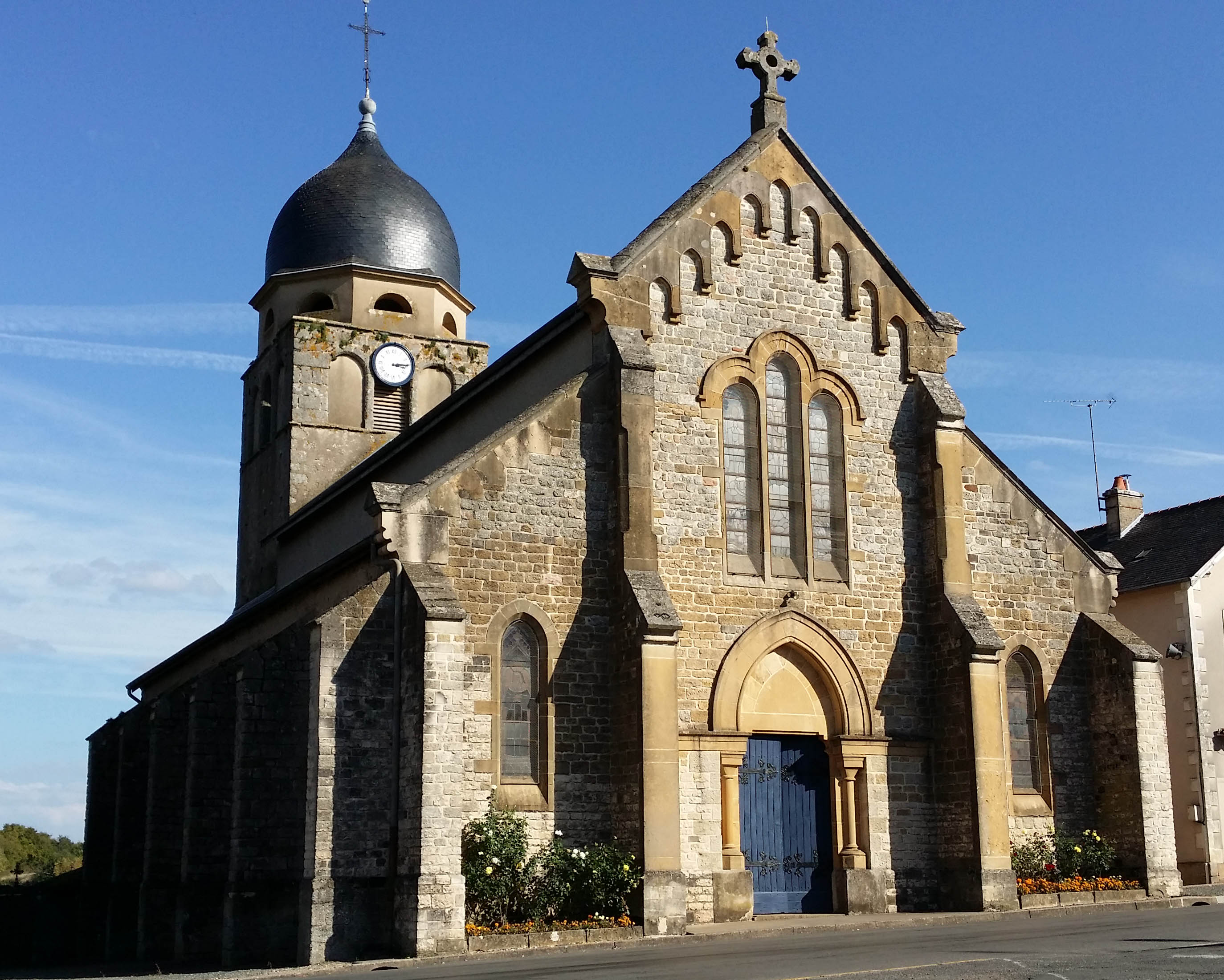 l'église Saint-Germain à Neuvy-Grandchamp